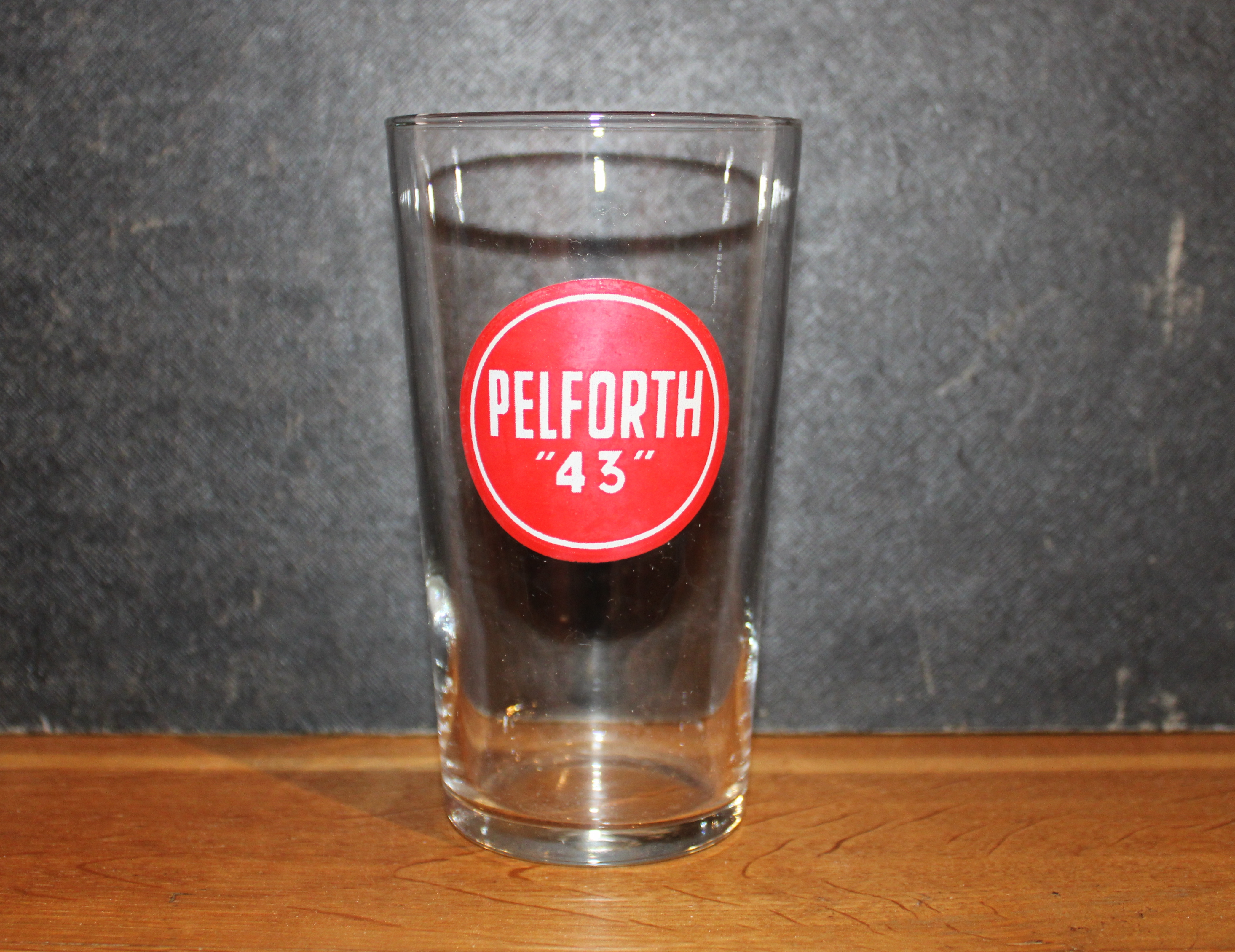 Verre à Bière Pelfort 43